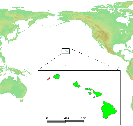 Hawaii Islands - Ni ihau.PNG